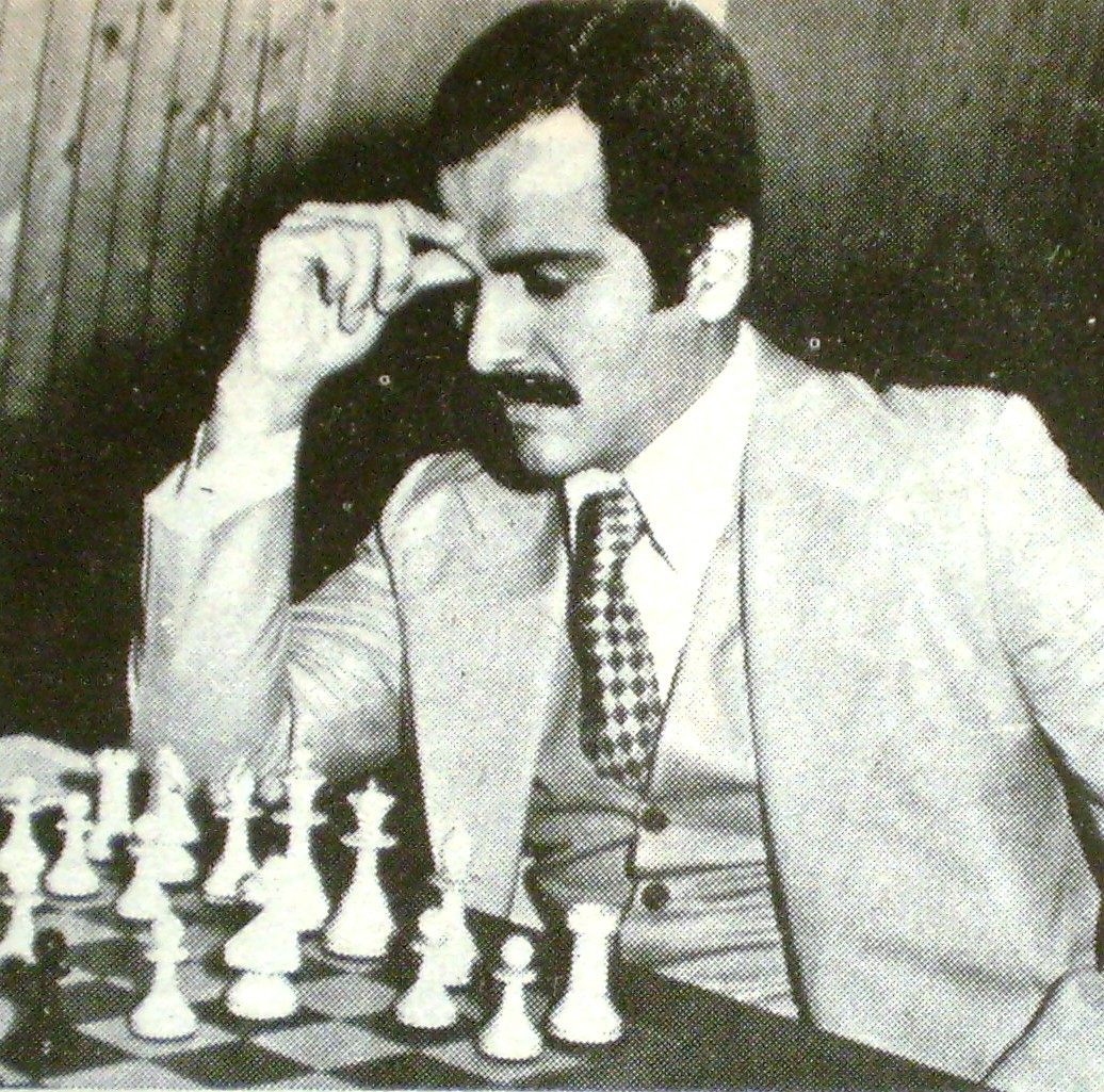 Miguel A. Quinteros